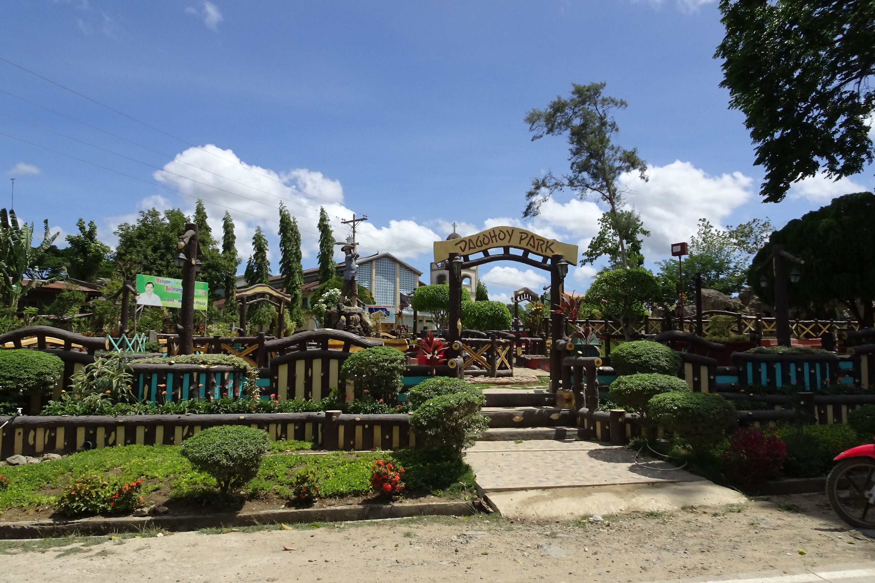 Dagohoy, Bohol, Philippines